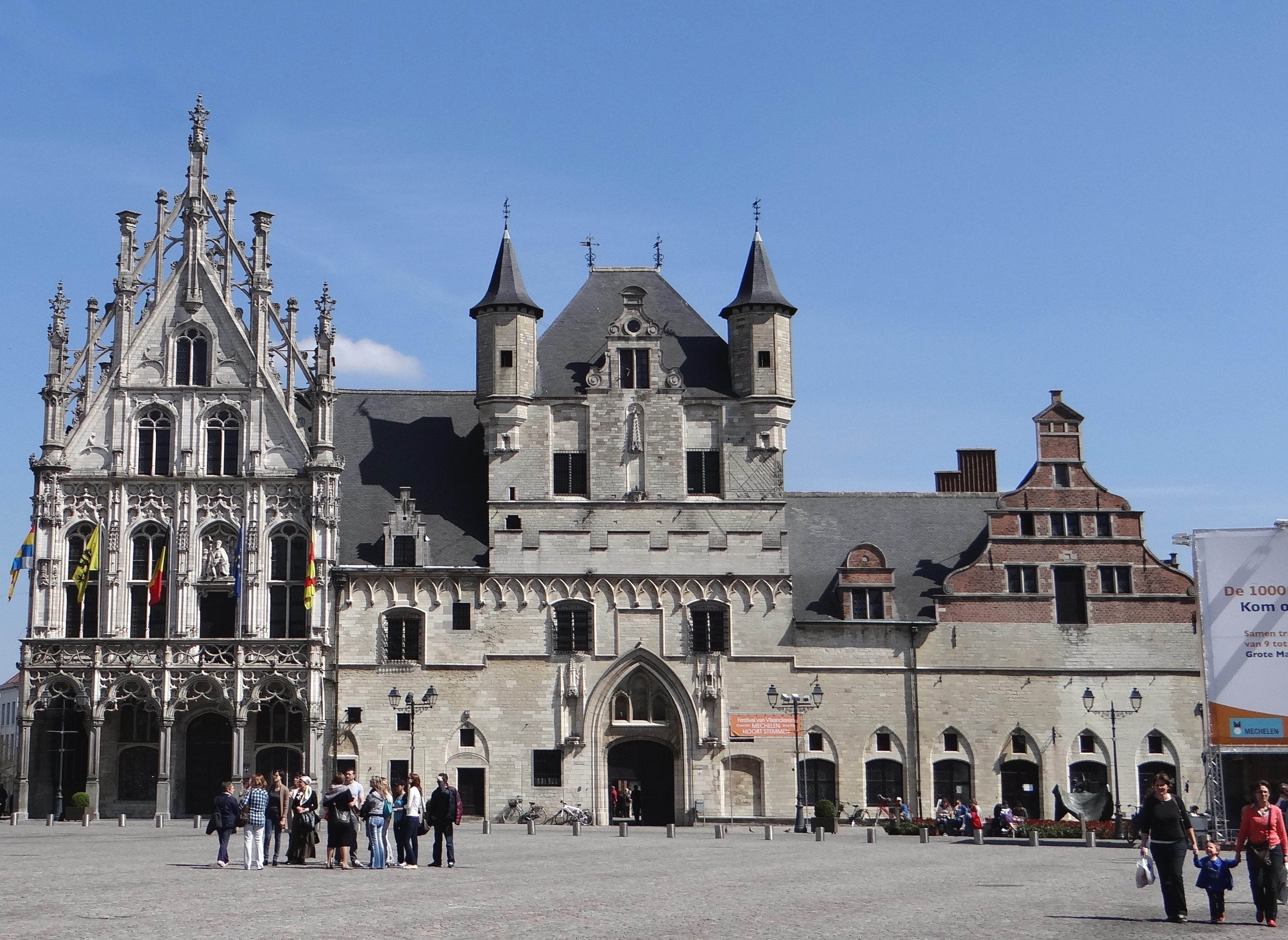 Stadhuis van de stad Mechelen, provincie Antwerpen, België. Voormalige lakenhal (rechter gedeelte op de foto), gotiek XIVe eeuw met ingebouwde belforttoren. Men neemt aan dat de oudere lakenhal uit de XIIIe eeuw aan de achterzijde van de huidige stond. Met de bouw - gestart in 1526 - van het gedeelte links op de foto, op de de plaats van de noordelijke vleugel van het complex, had men de bedoeling een paleis ter beschikking te stellen voor de Grote Raad (dit parlement was reeds in 1473/1474 in Mechelen gevestigd). Echter halverwege de tweede bouwlaag werden de werken stopgezet en de Raad bleef vergaderen in het Schepenhuis. Pas in de periode 1900 - 1911 werd dit noordelijk gedeelte voltooid in neogotische stijl. Zie ook : [1]